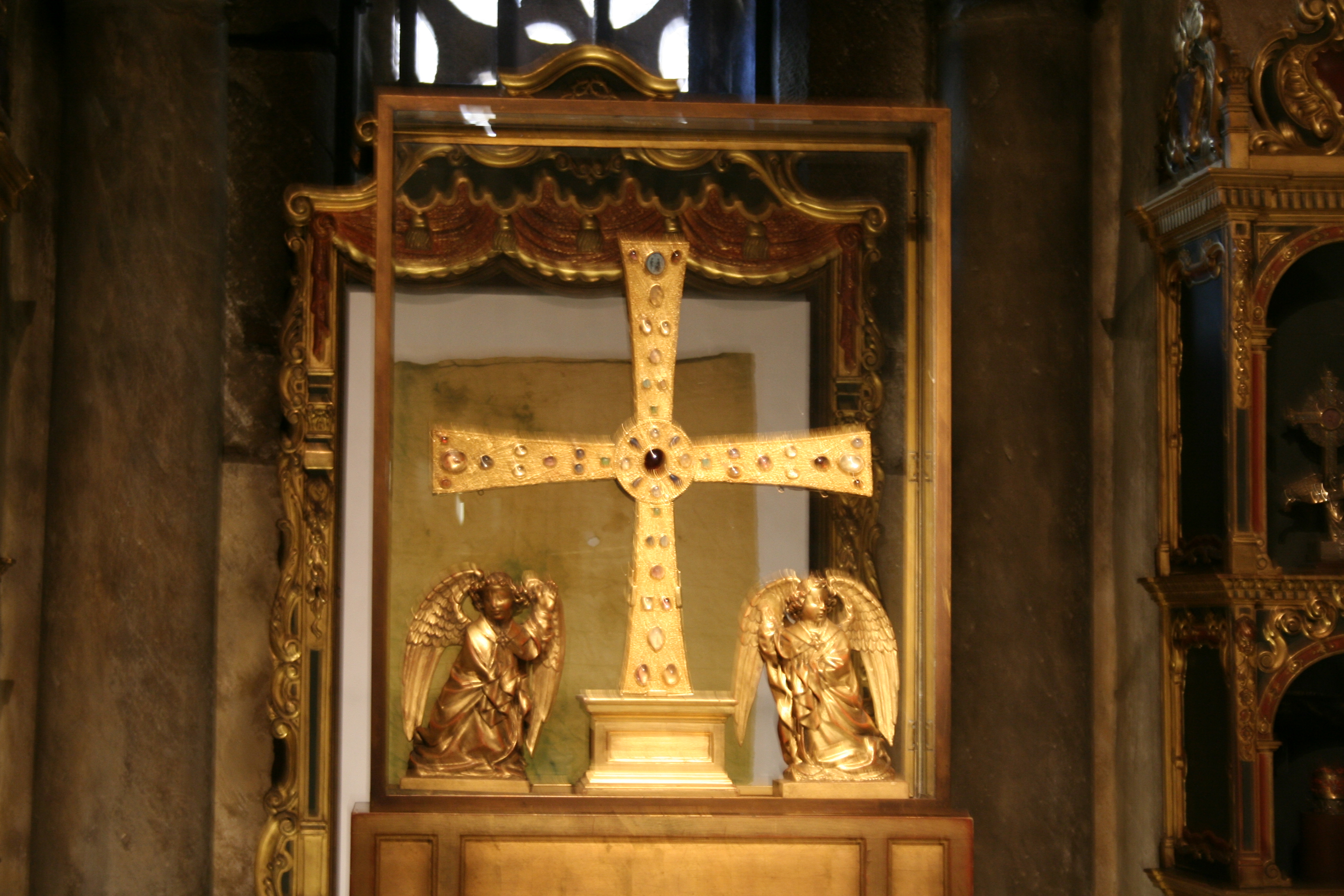 Cruz de los Ángeles, conservada en el interior de la Cámara Santa de Oviedo.